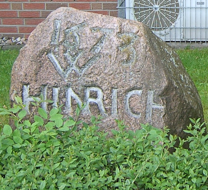 Hamburg, Grenzstein Eilbek/Wandsbek, sog. "Rantzaustein" Zeichenerklärung: Inschrift Ostseite: 1573- Jahr der Setzung, W- Wandsbek, HINRICH RANZO(W) (Heinrich Rantzau) Inschrift Westseite: 10 - laufende Nummer, Kreuz im Kreis- Zeichen des Hospitals zum Heiligen Geist, B - Barmbek This is a photograph of an architectural monument.